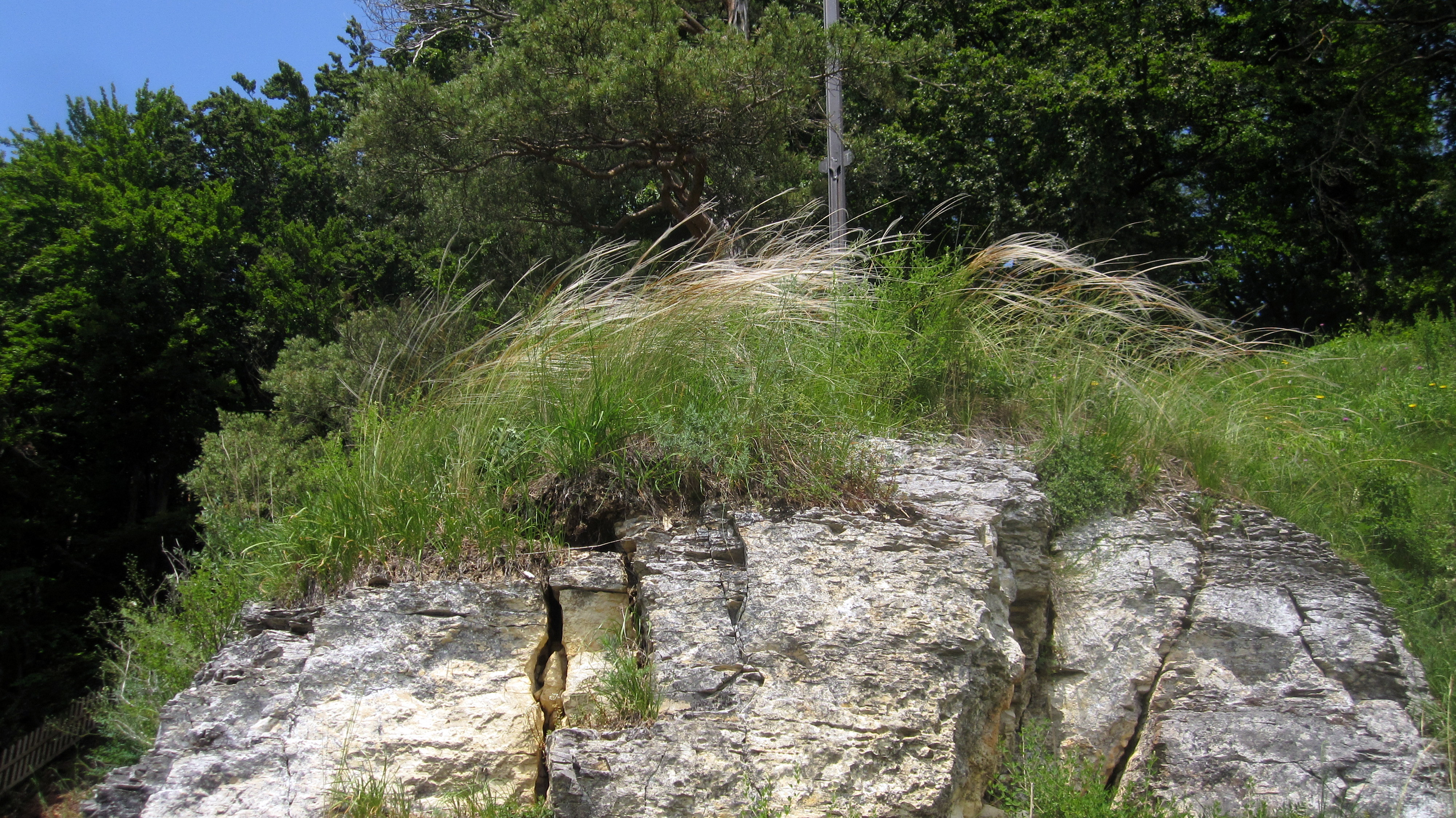 Das weltweit einzige Vorkommen des Bayerischen Federgrases Stipa pulcherrima ssp. bavarica auf einer Felsnase im Naturschutzgebiet Finkenstein, fotografiert von einem Mitarbeiter des Bayerischen Landesamts für Umwelt im Rahmen des FFH-Monitorings 2013. Der Standpunkt des Fotografen ist zum Schutz der Population und wegen Absturzgefahr für die Öffentlichkeit nicht zugänglich und durfte hier nur mit behördlicher Sondergenehmigung zur Bestandsaufnahme betreten werden.